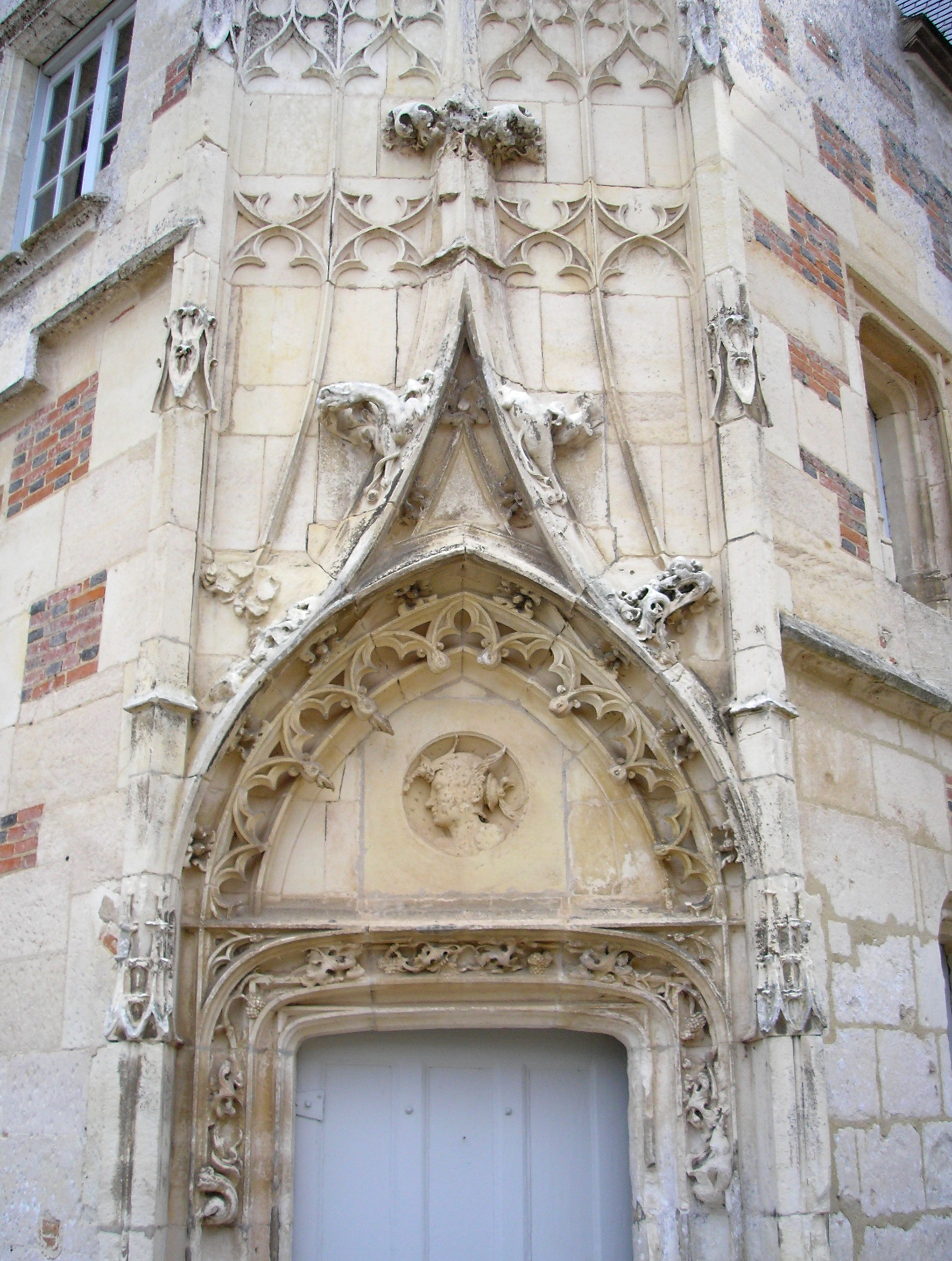 Mortrée (Normandie, France). Portail Renaissance dans la cour intérieure du château d'Ô.